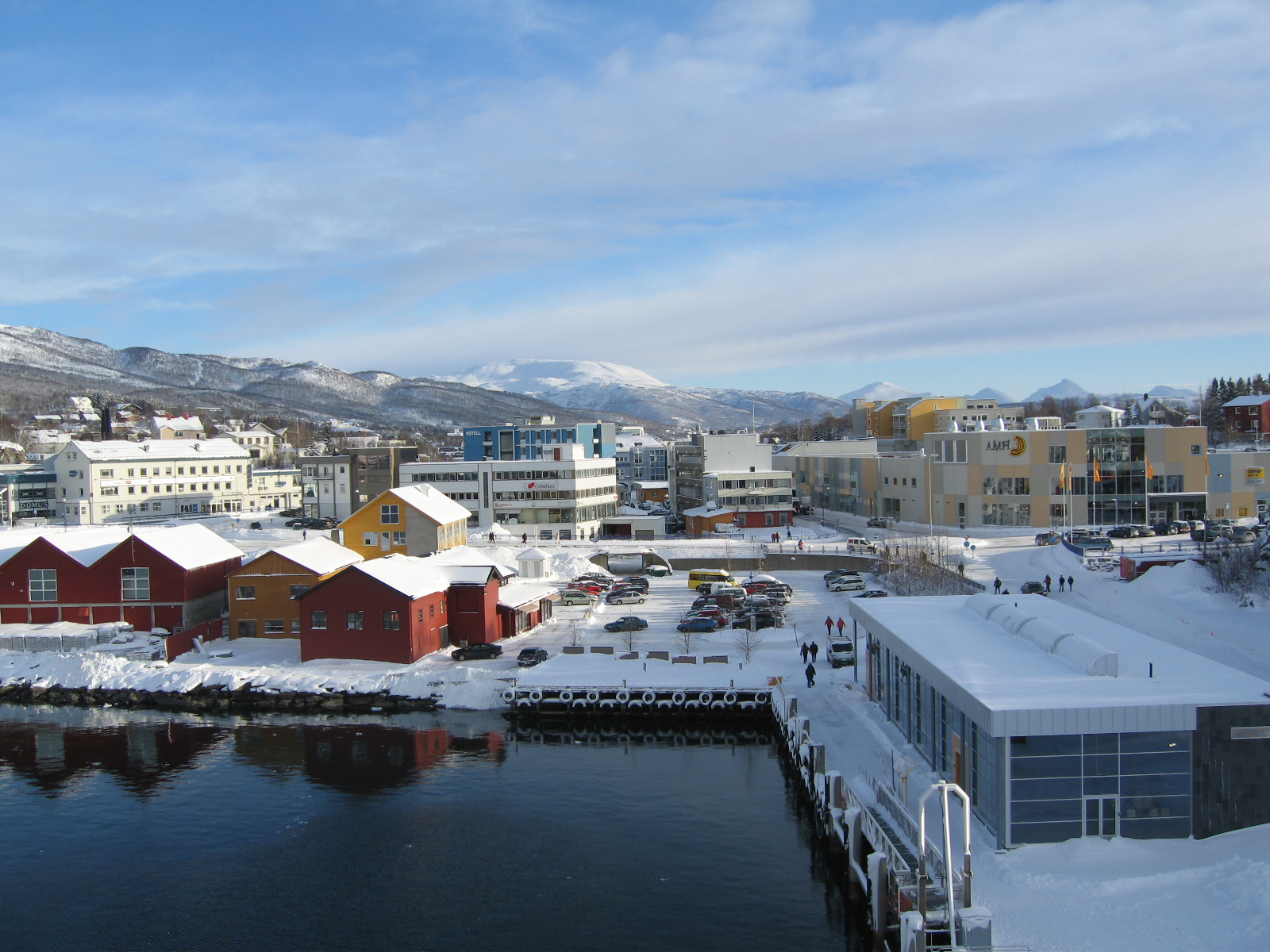 Finnsnes sentrum sett fra dekk på Hurtigruta